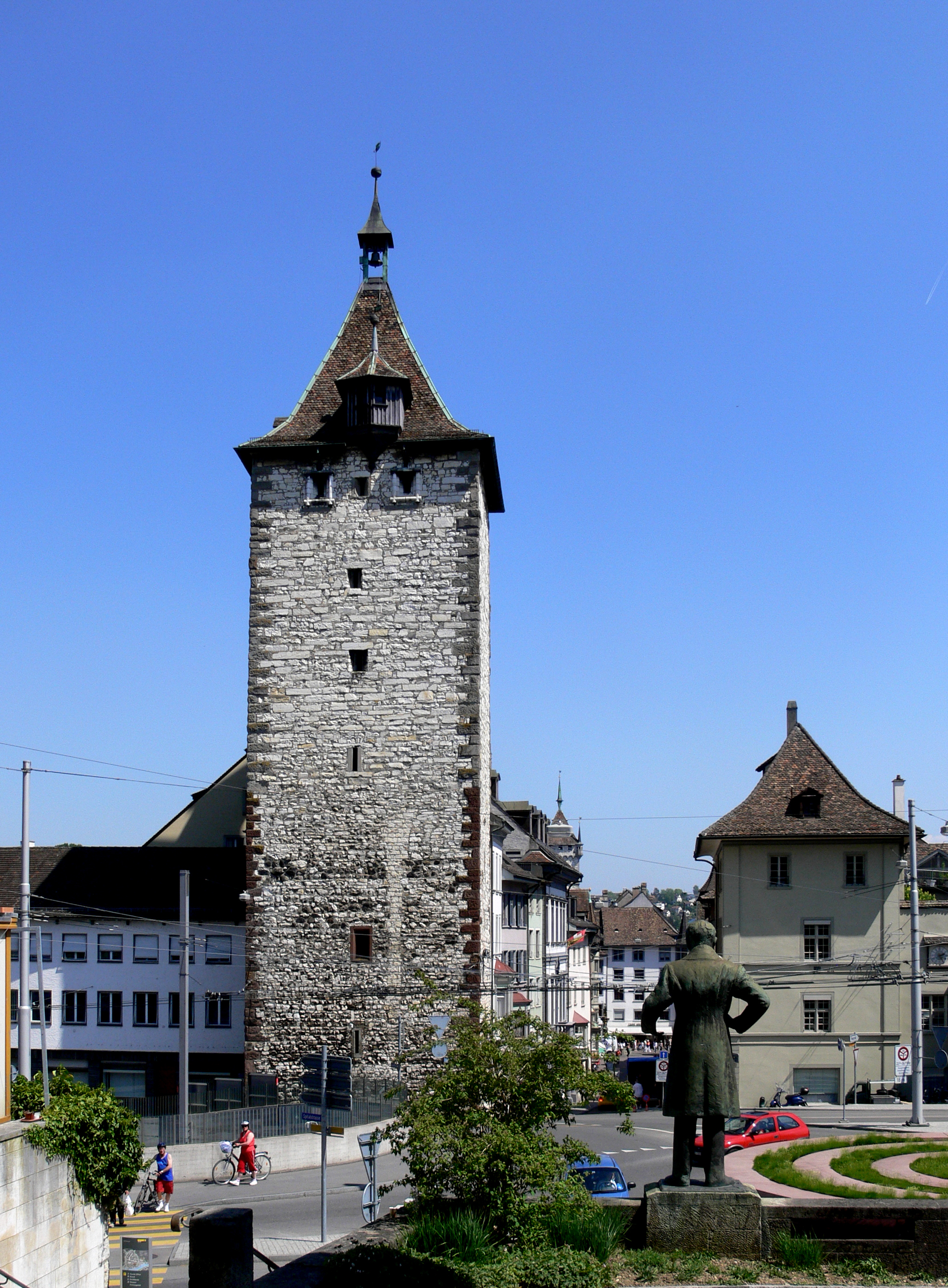 Schaffhausen, Obertorturm (Feldseite) mit Blick in die Straße Oberstadt, im Vordergrund das Denkmal für Johann Conrad Fischer